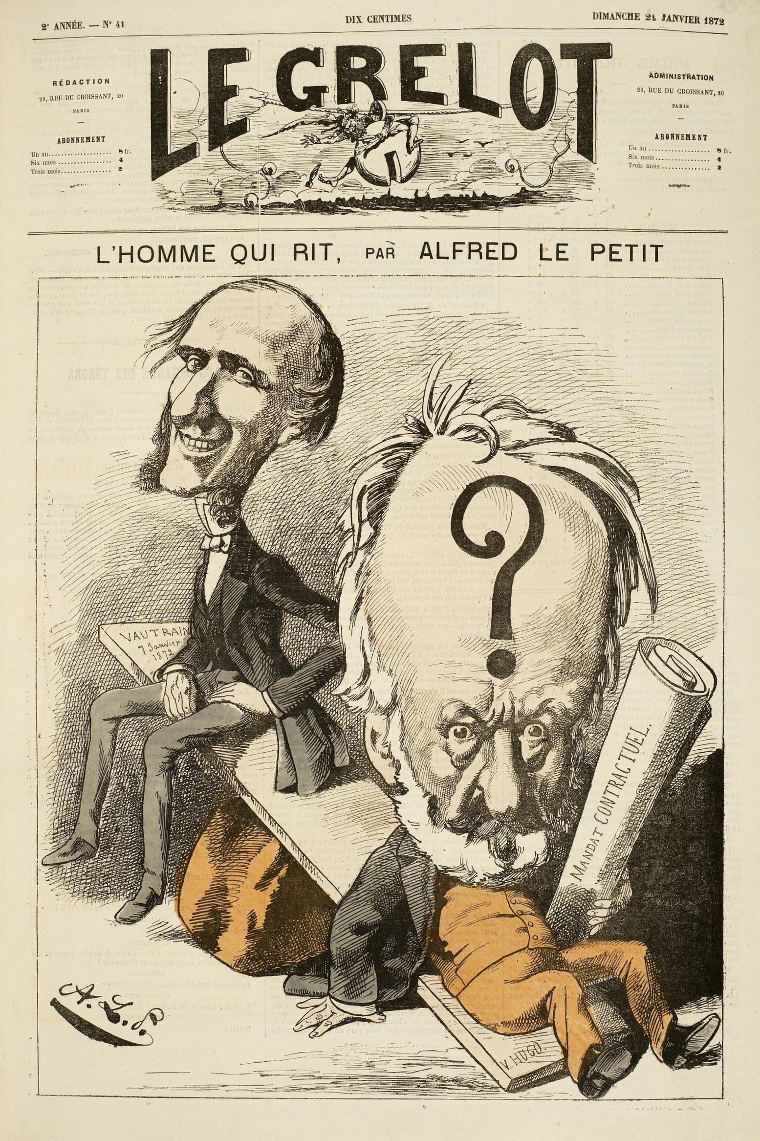 "L'homme qui rit." [Élection du 7 janvier 1872]